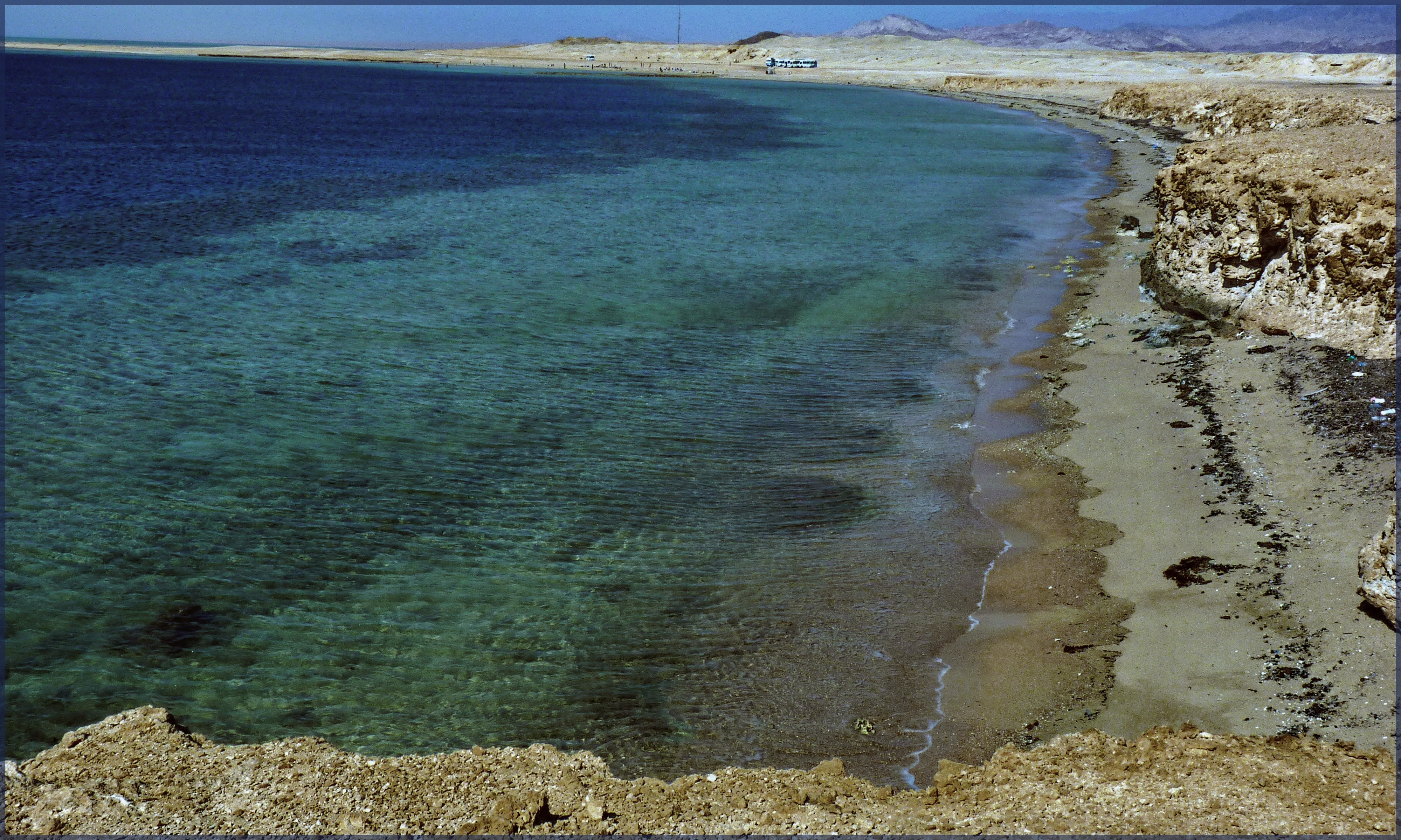 la barriera corallina di Ras Mohammed